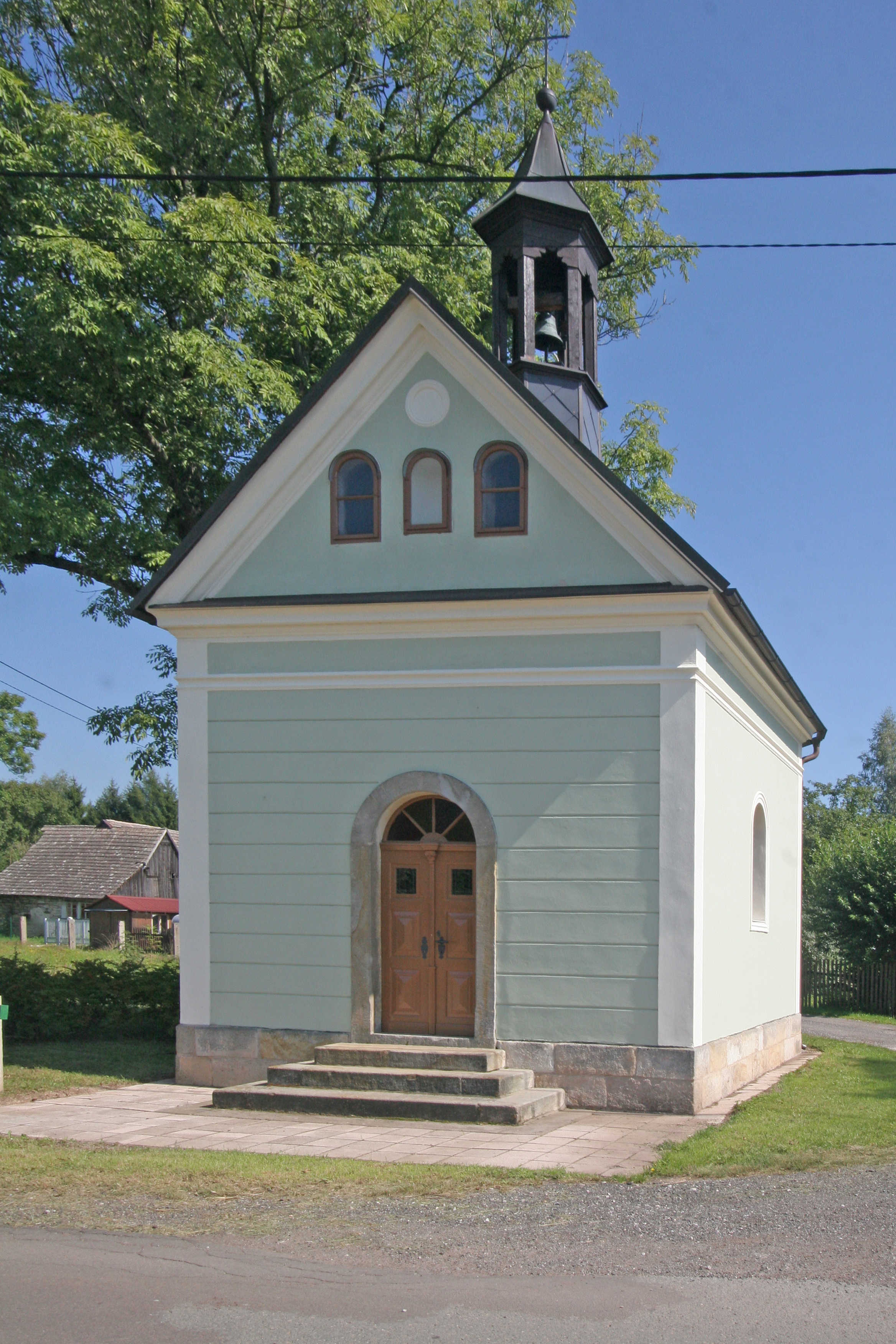 Studenec kaple